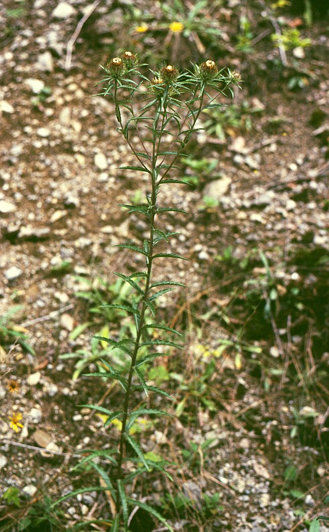 Langblatt-Golddistel (Carlina biebersteinii subsp. biebersteinii), Korbblütler (Asteraceae) - Österreich/Austria/Autriche: Niederösterreich, Erlauftal E Gaming, Vordere Tormäuer